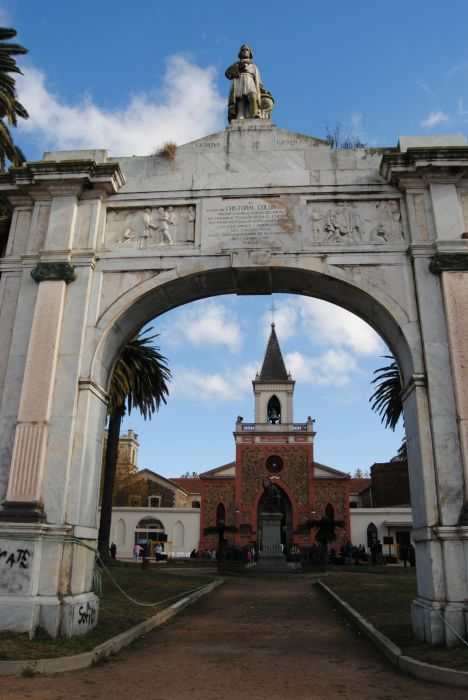 Es el único que se encuentra en Uruguay